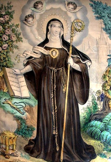 Santa Gertrudis de Helfta, llamada también la Magna o la Grande.